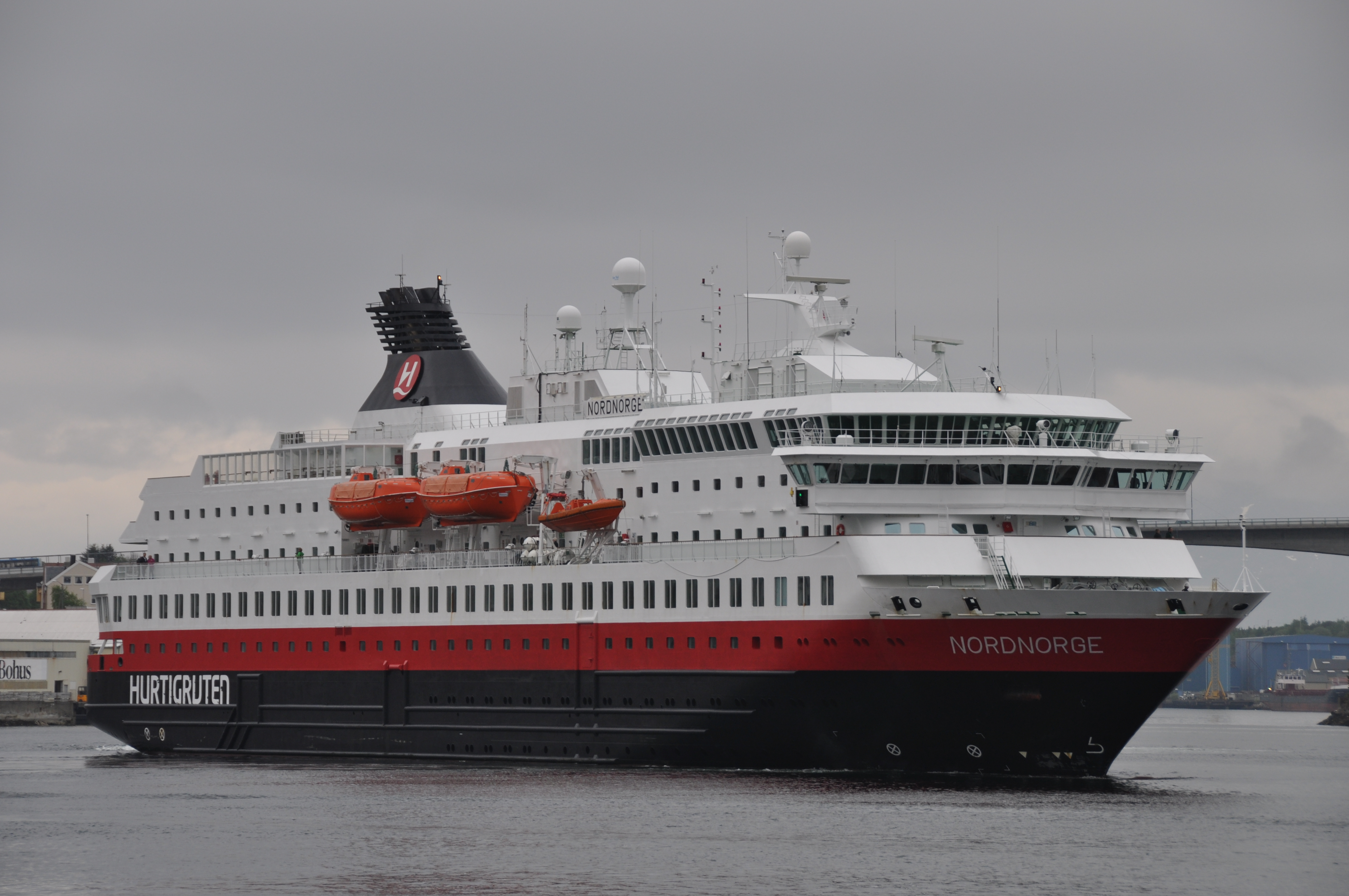 MS Nordnorge